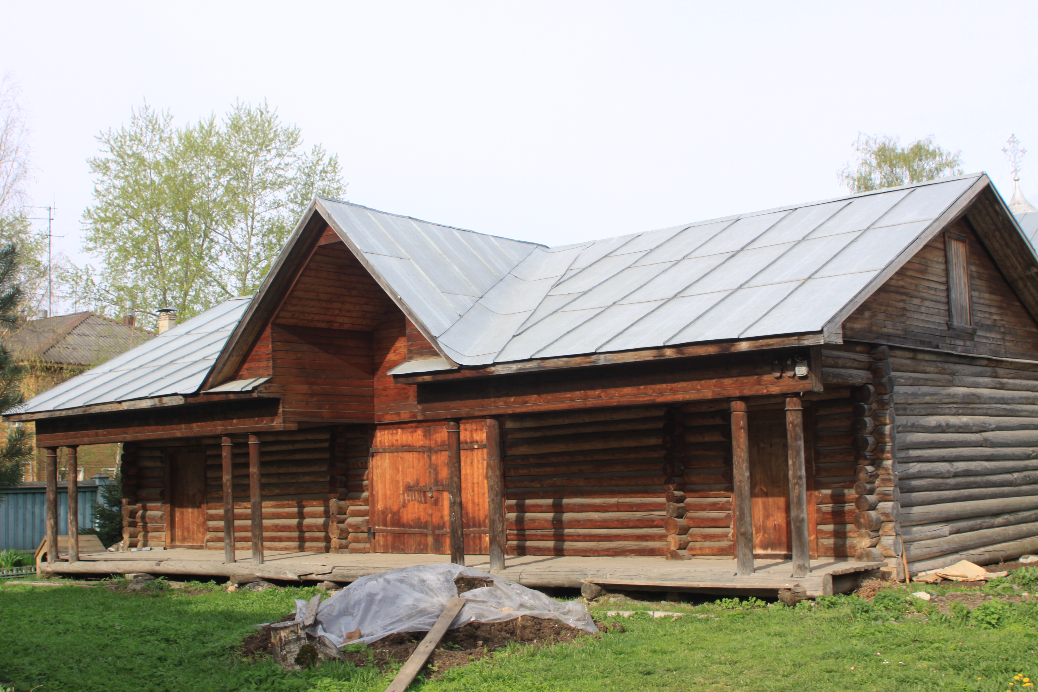 Каретник в Вологде (Верхний Посад)